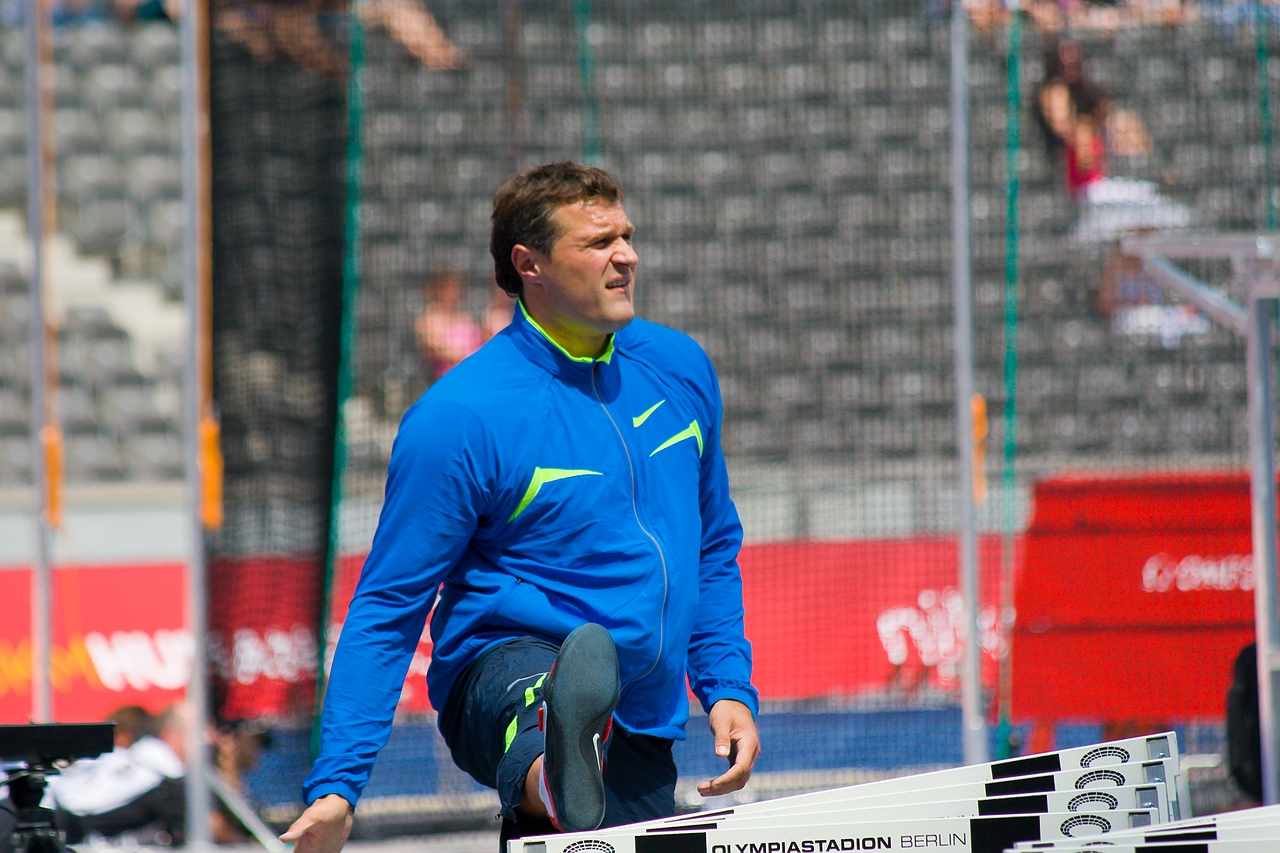 Virgilijus Alekna am Meeting Istaf di Berlino in una data della "Golden League" del 2008